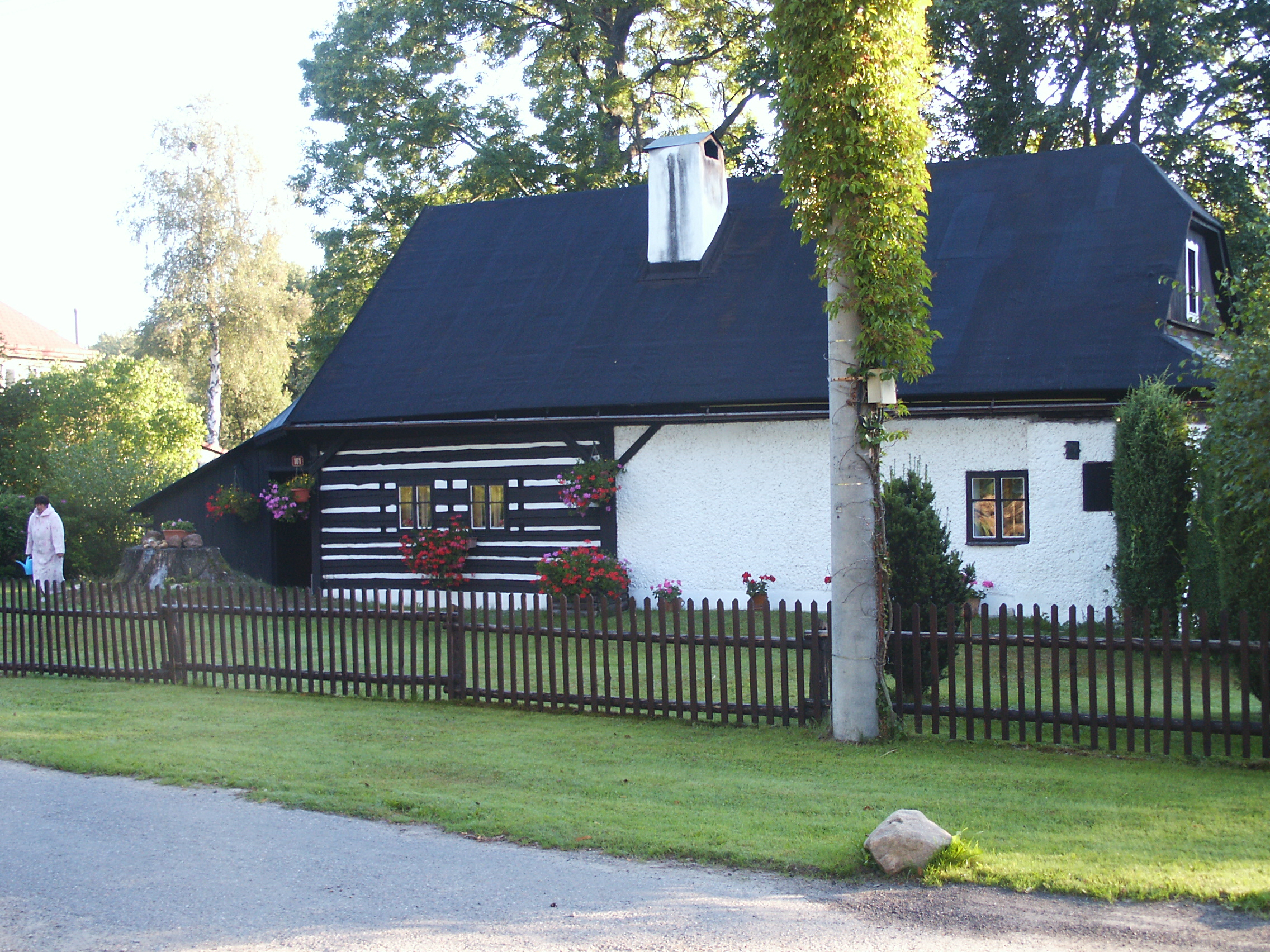 Pazderna - bývalá (Borová), Borová 181